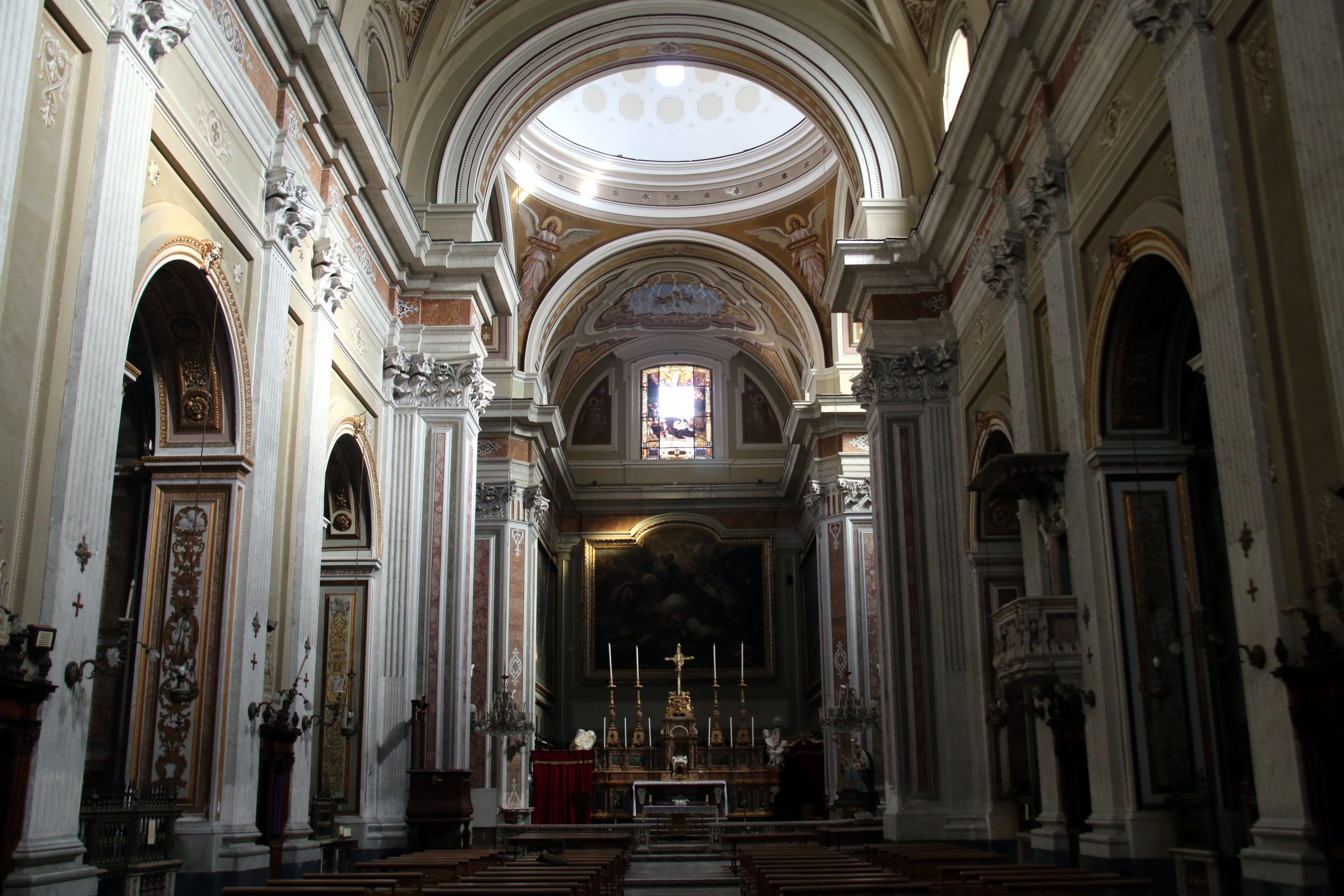 Chiesa di Santa Teresa degli Scalzi (Napoli), interno